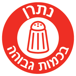 הסמל האדום שיוצג על פי הוראת משרד הבריאות על מוצרי מזון בעלי כמות נתרן גבוהה.